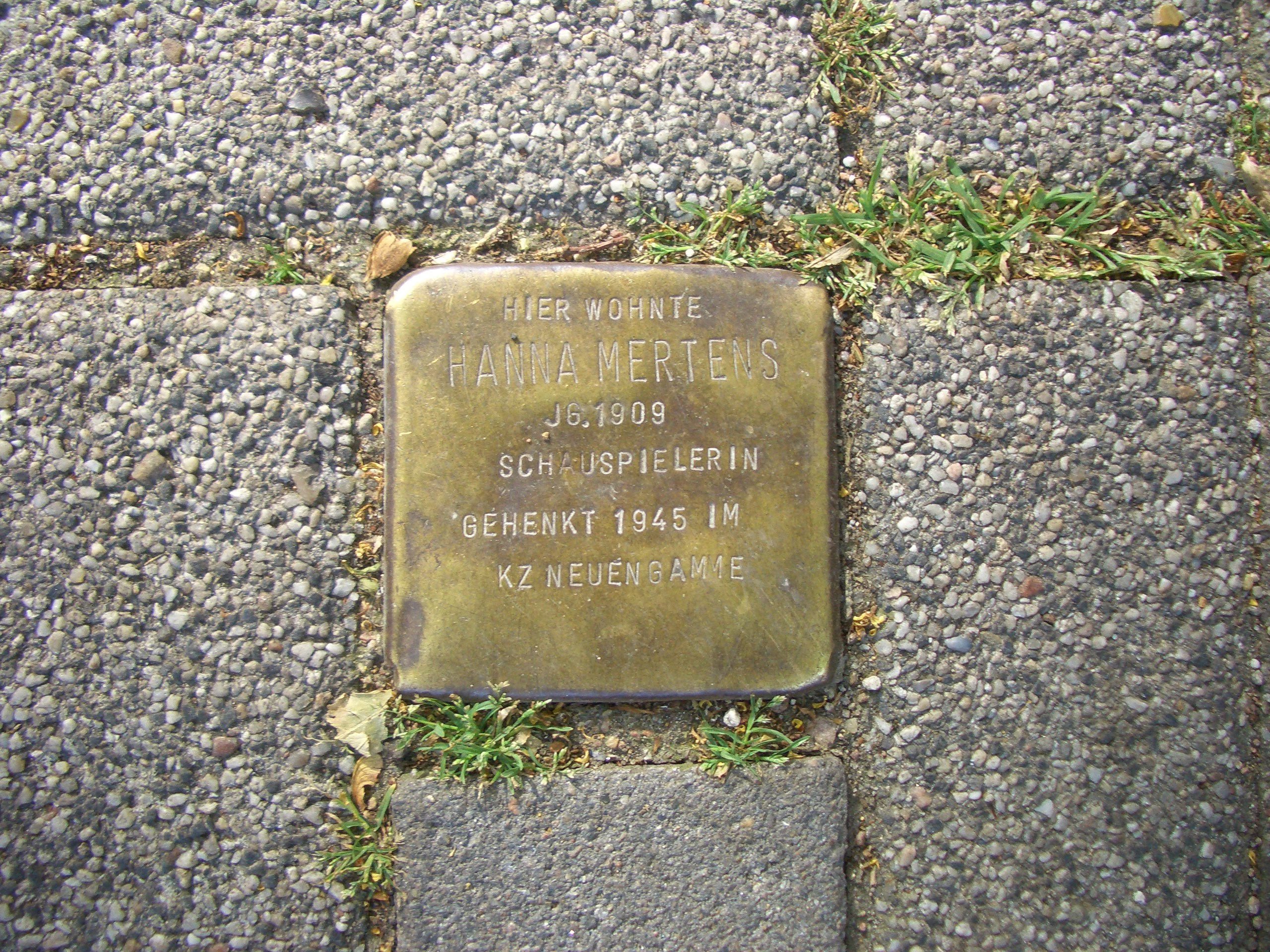 Stolperstein für Hanne Mertens vor dem Gebäude Sierichstraße 66 in Hamburg-Winterhude.